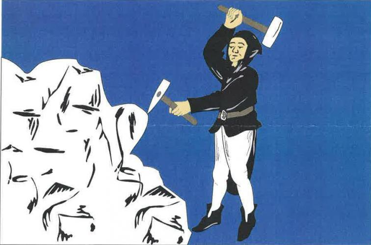 Stříbrná Skalice vlajka